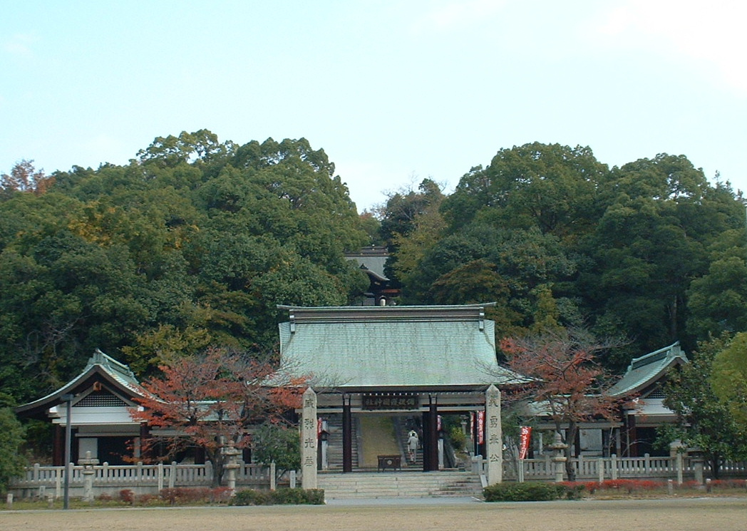 Bingo Gogoku Jinja Photo by Carpkazu